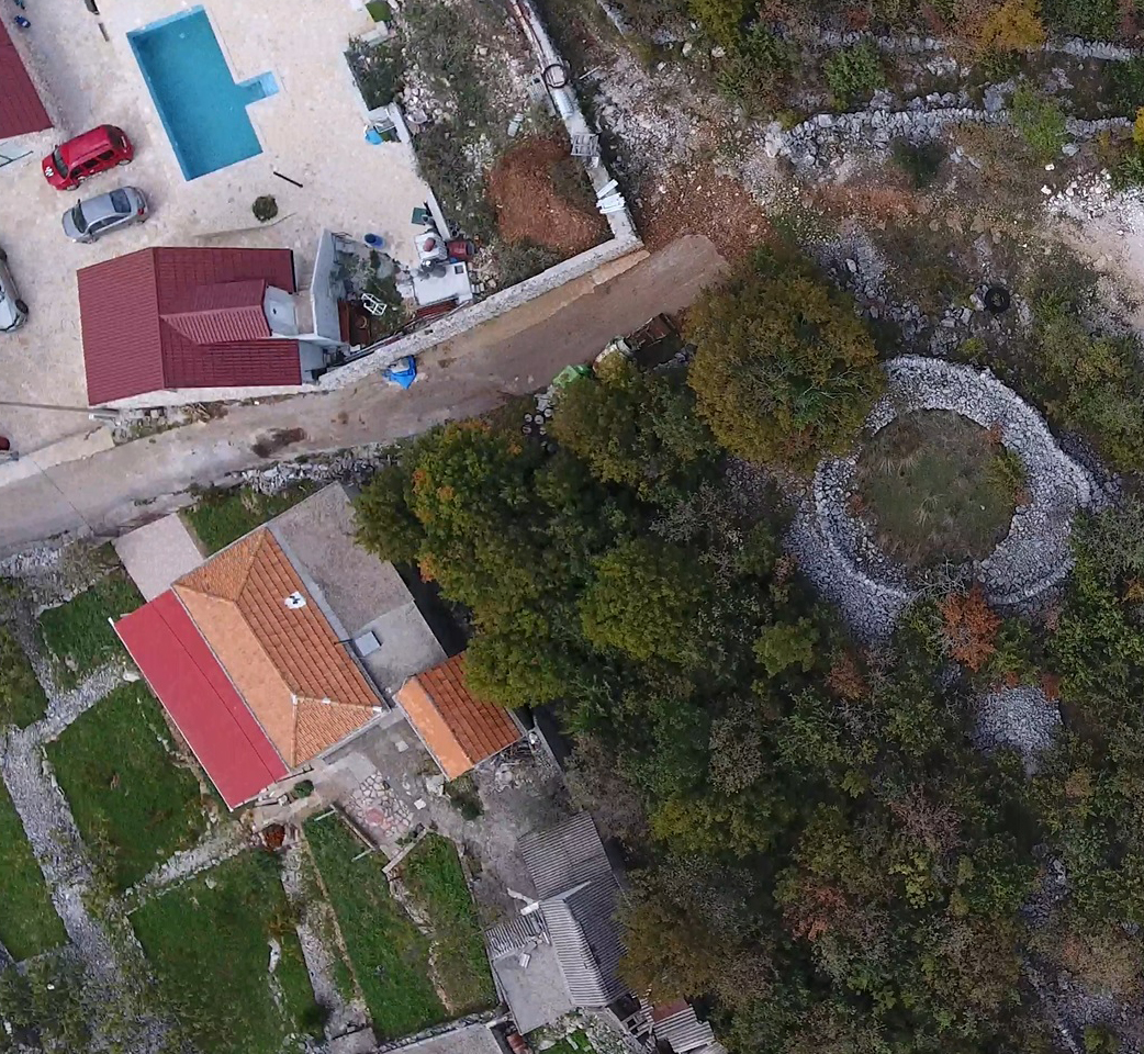 Vjerovatni Ilirski tumulus.Potrebno detaljnije istražiti.